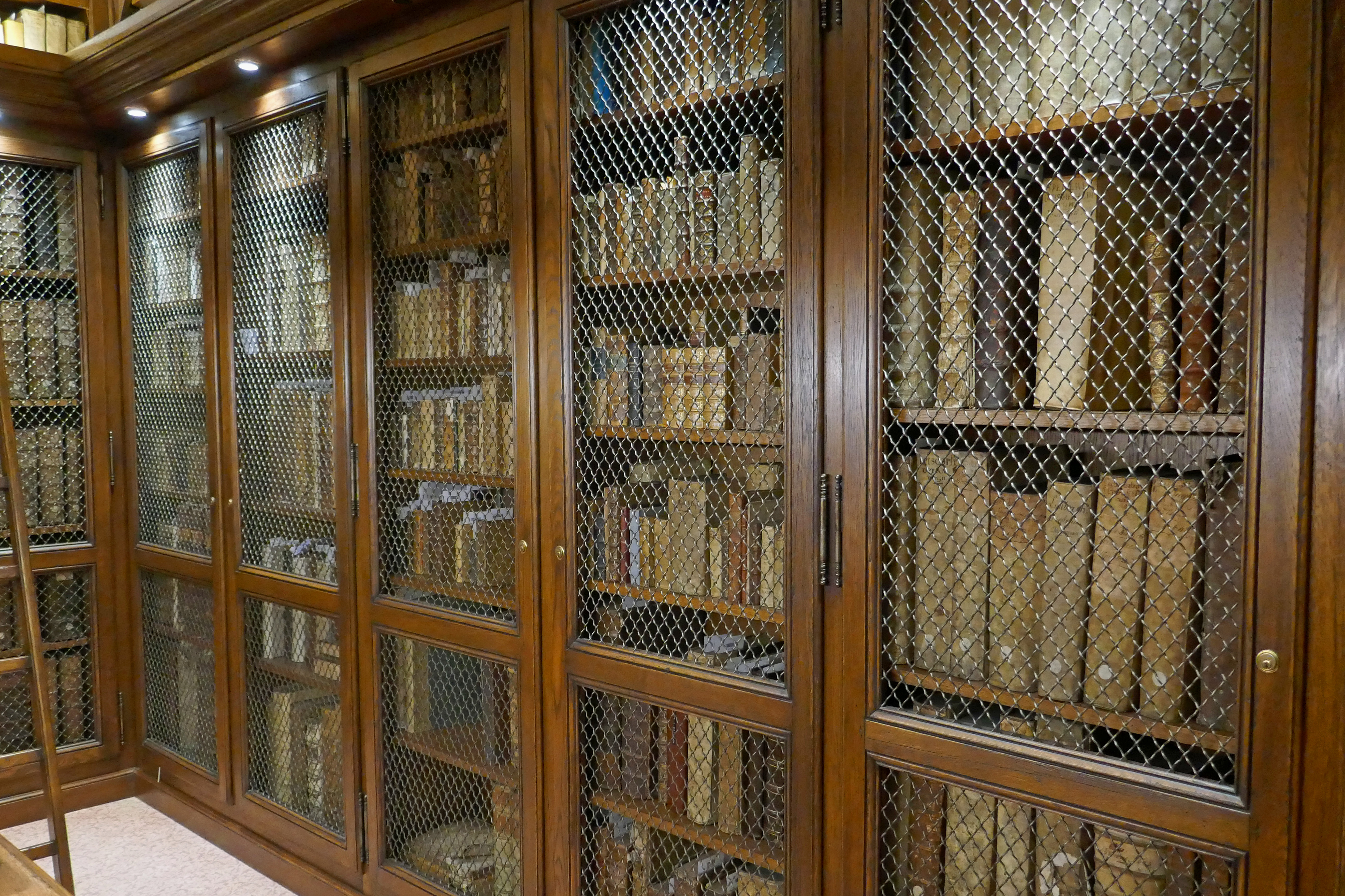 Legs Rodolphe Peter à la médiathèque protestante de Strasbourg (à droite, les 4 colonnes d'étagères, plus la partie supérieure de la 5e).